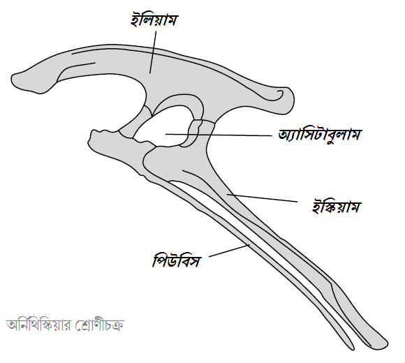 অর্নিথিস্কিয়া জাতীয় ডাইনোসরদের শ্রোণীচক্রের সাধারণ গঠন। প্রধান হাড়গুলো চিহ্নিত করা আছে।